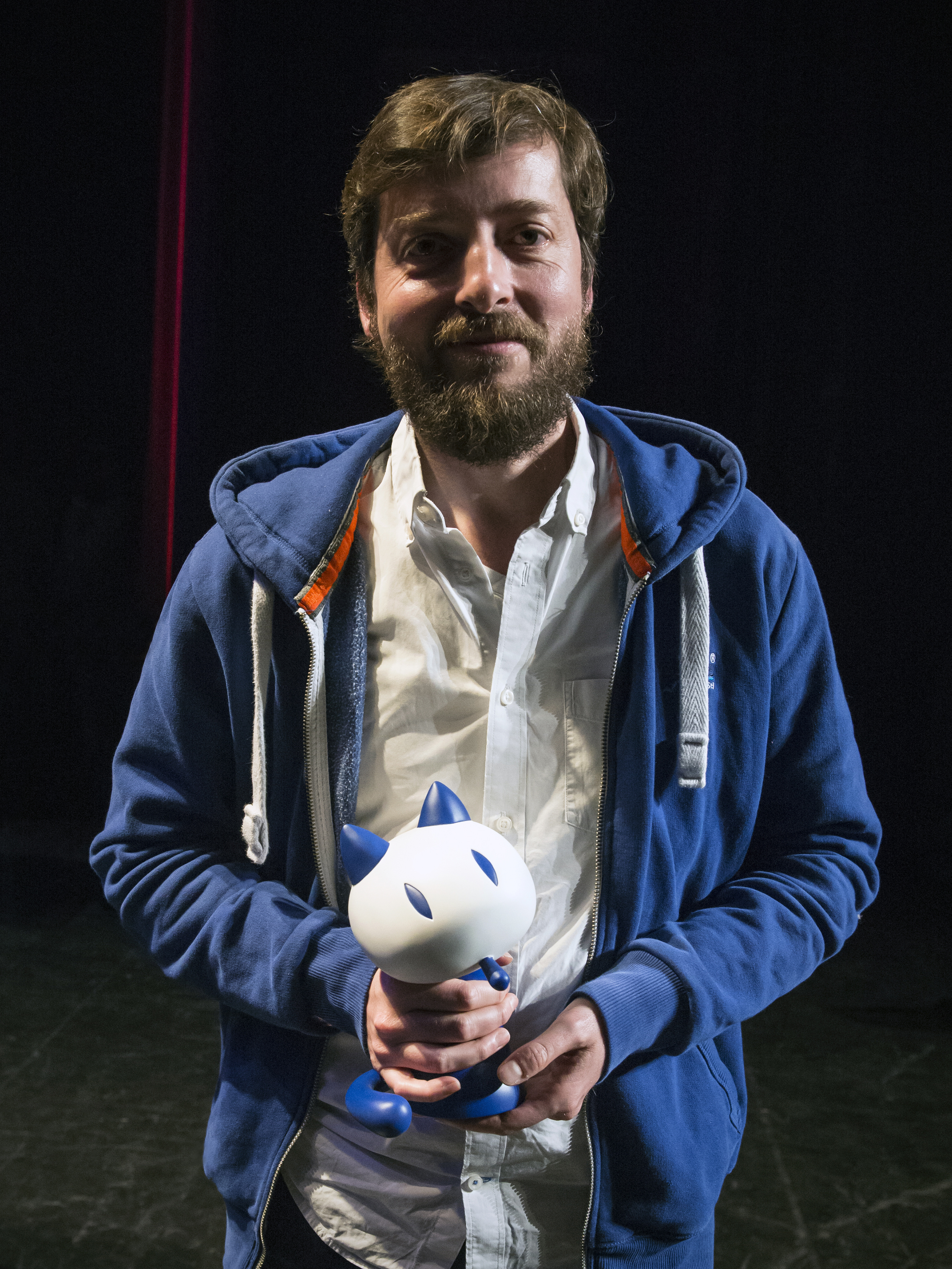 Matthieu Bonhomme et le Fauve du prix du public Cultura au Festival International de la Bande Dessinée d'Angoulême 2017.